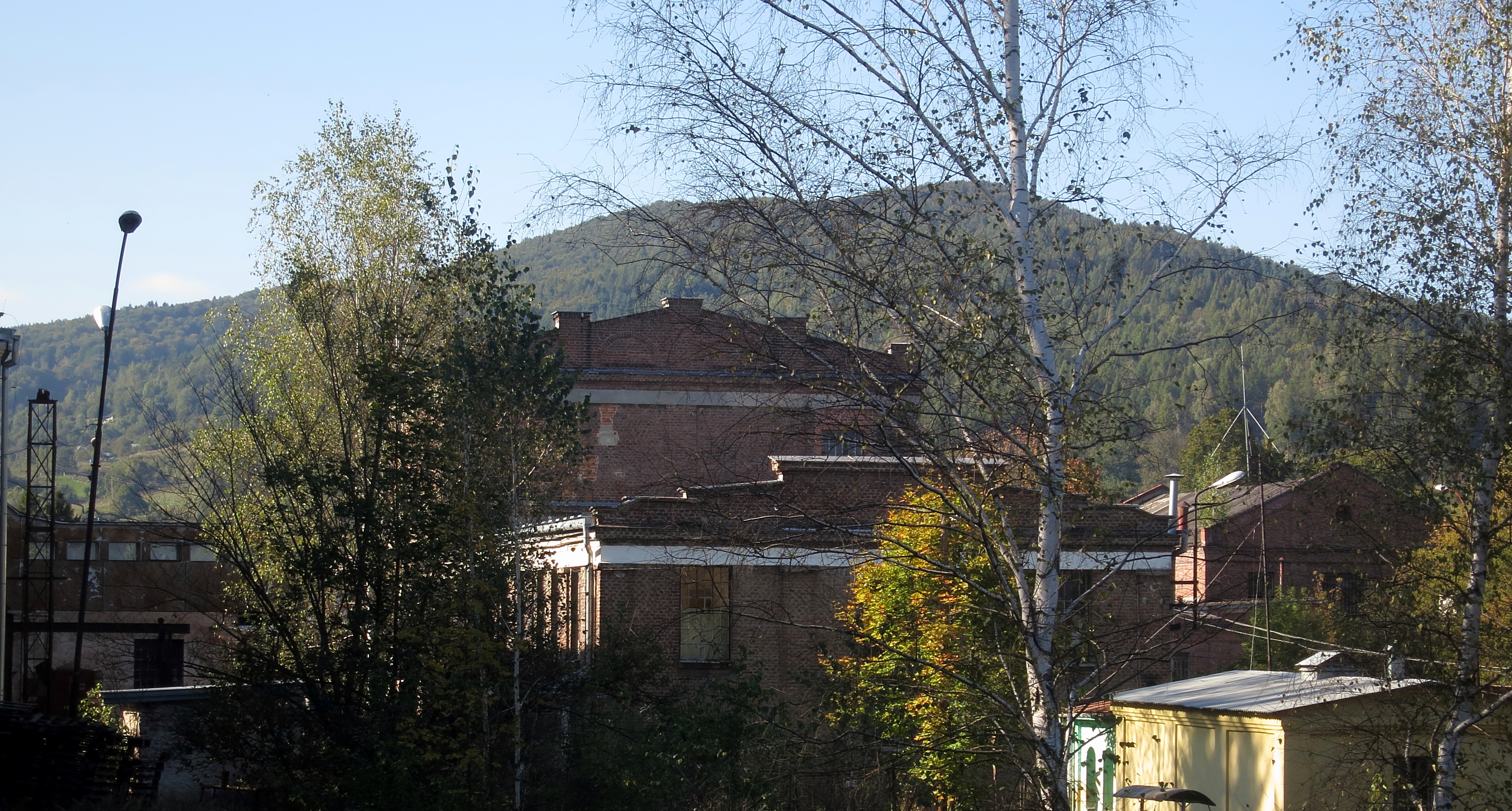 Ustrzyki Dolne, zespół zabudowań rafinerii nafty, pocz. XX